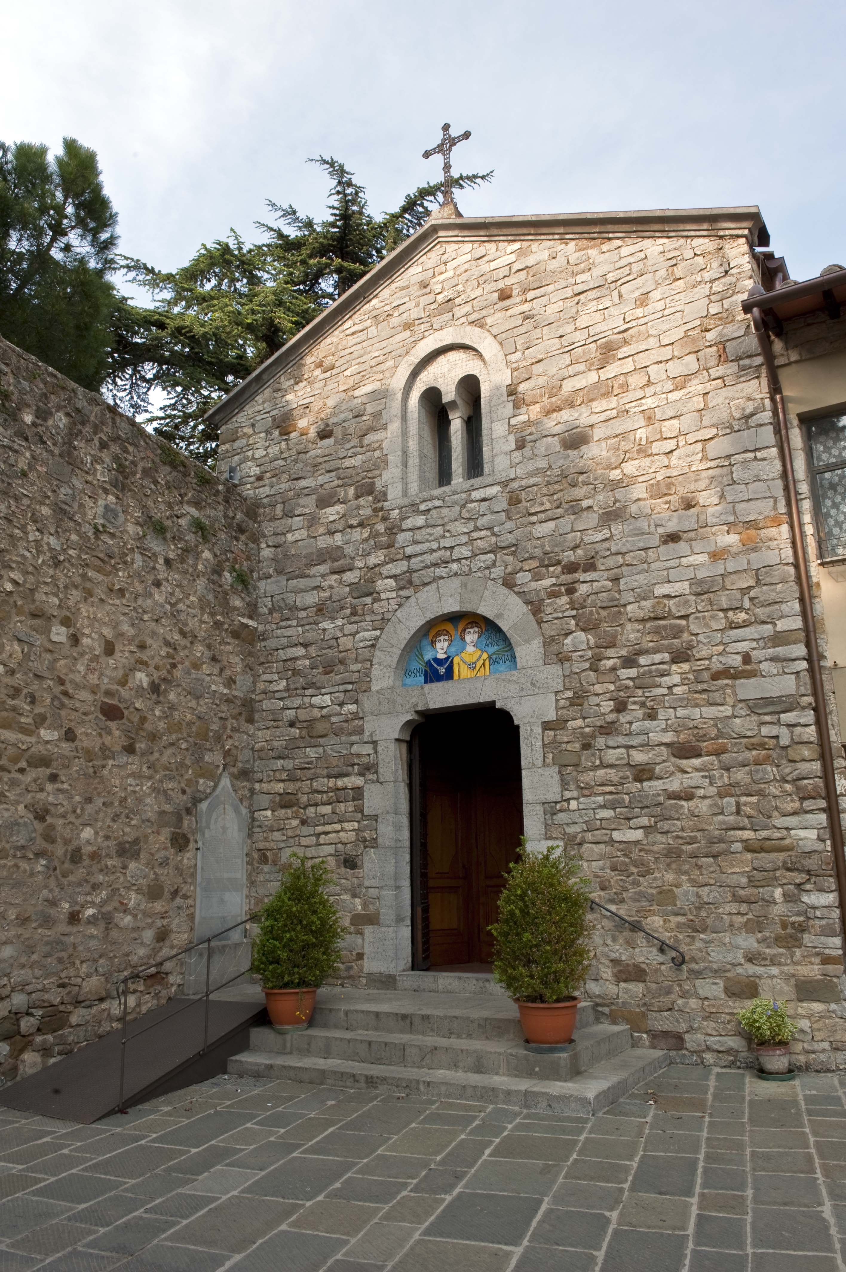 Pieve dei Santi Cosma e Damiano a San Gusmè - Castelnuovo Berardenga - Siena